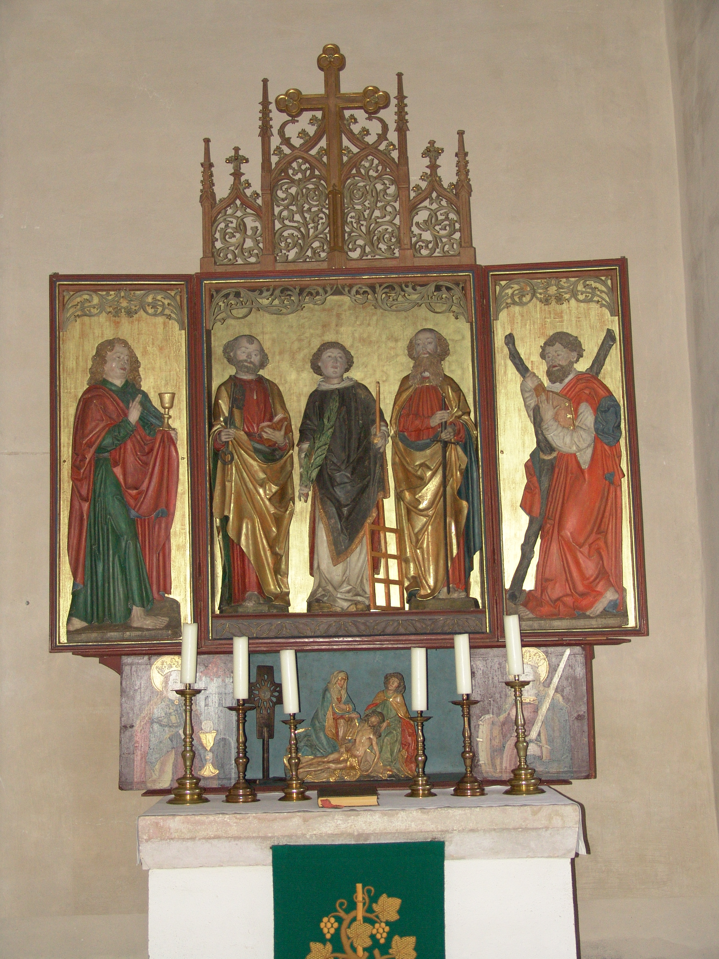 Füttersse St. Laurentius